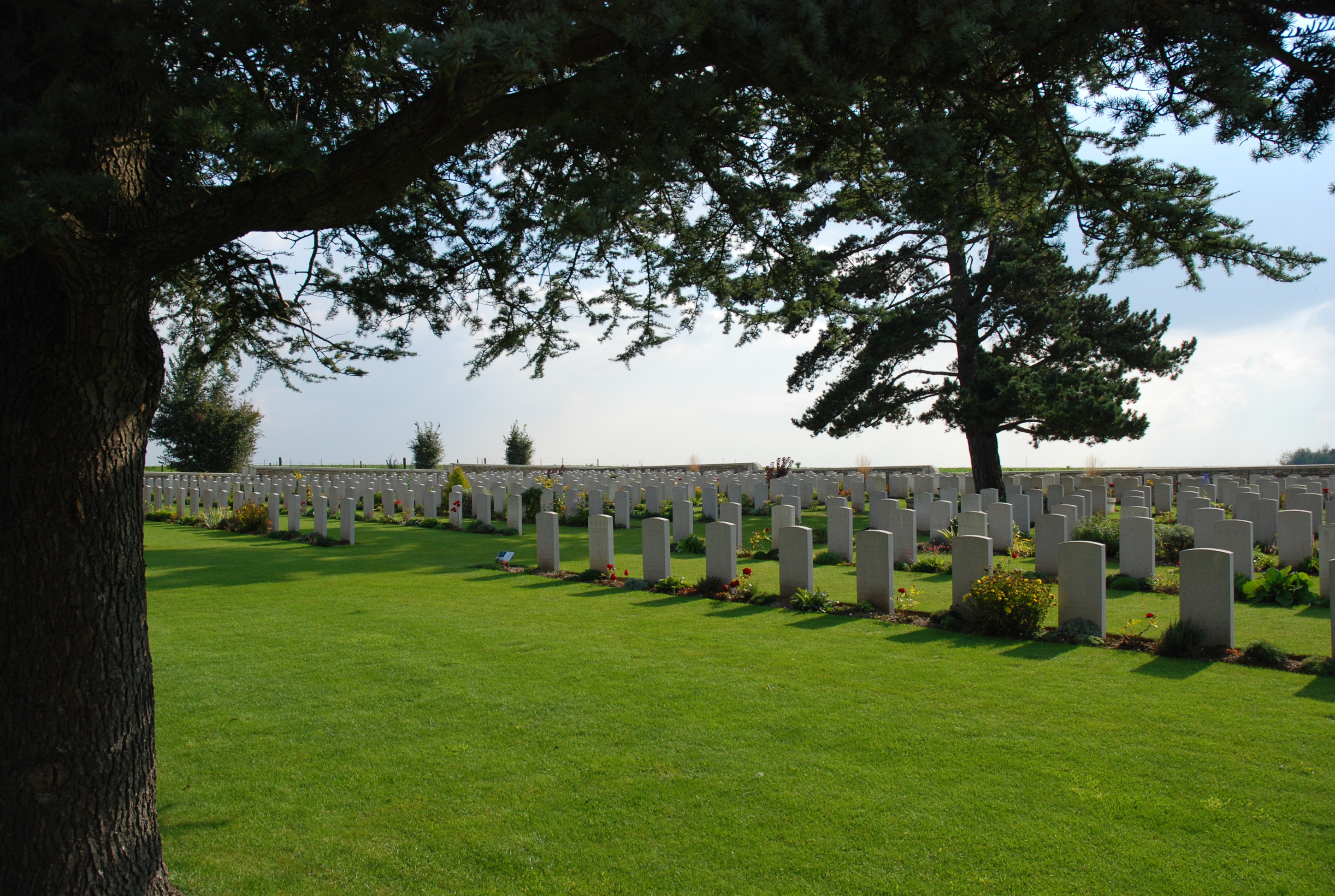 Het Chinees kerkhof te Noyelles sur Mer, Frankrijk